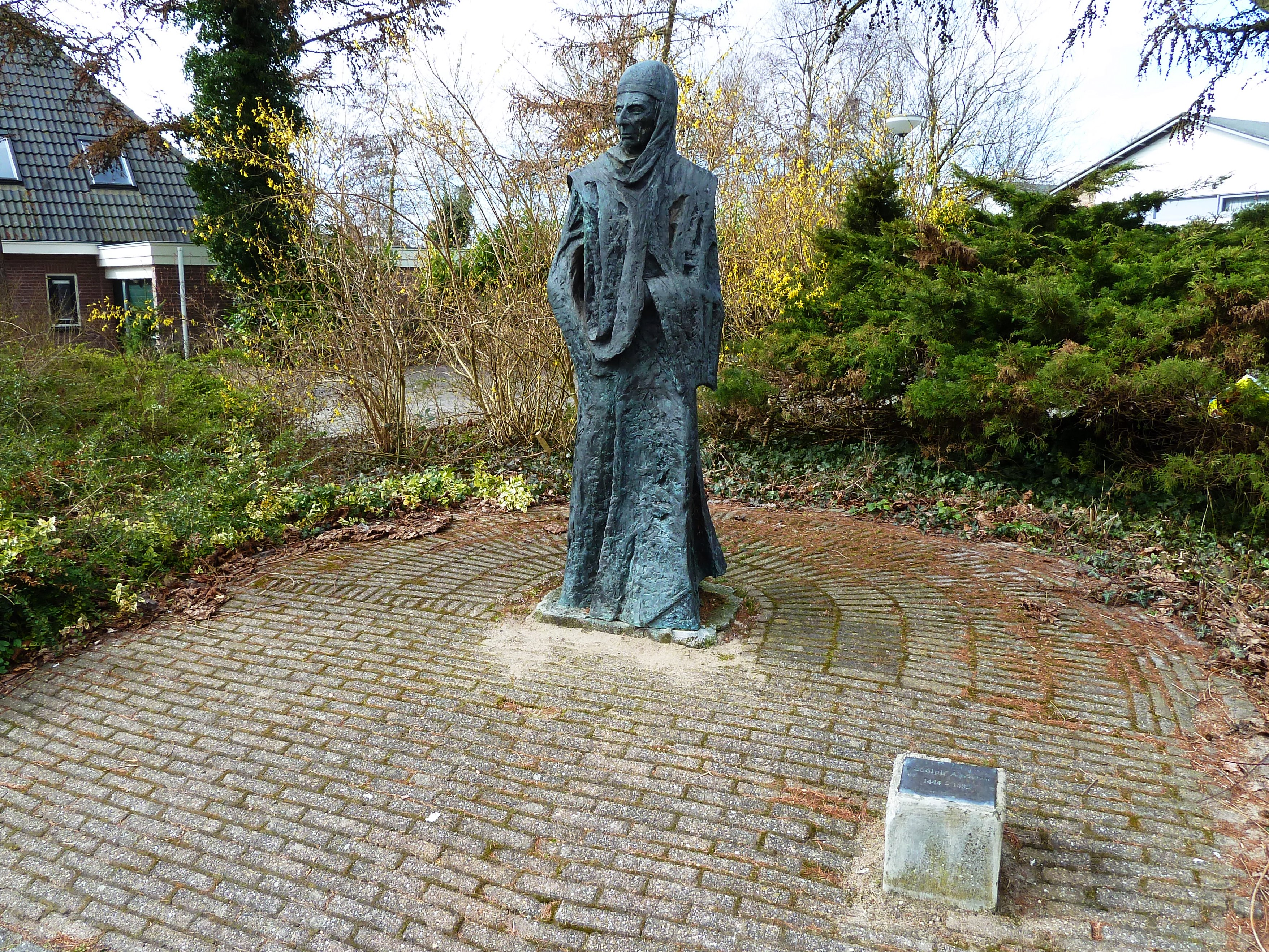 Standbeeld van Rudolf Agricola in Baflo (Winsum, Groningen, Nederland) van de hand van Jan Steen (1982).